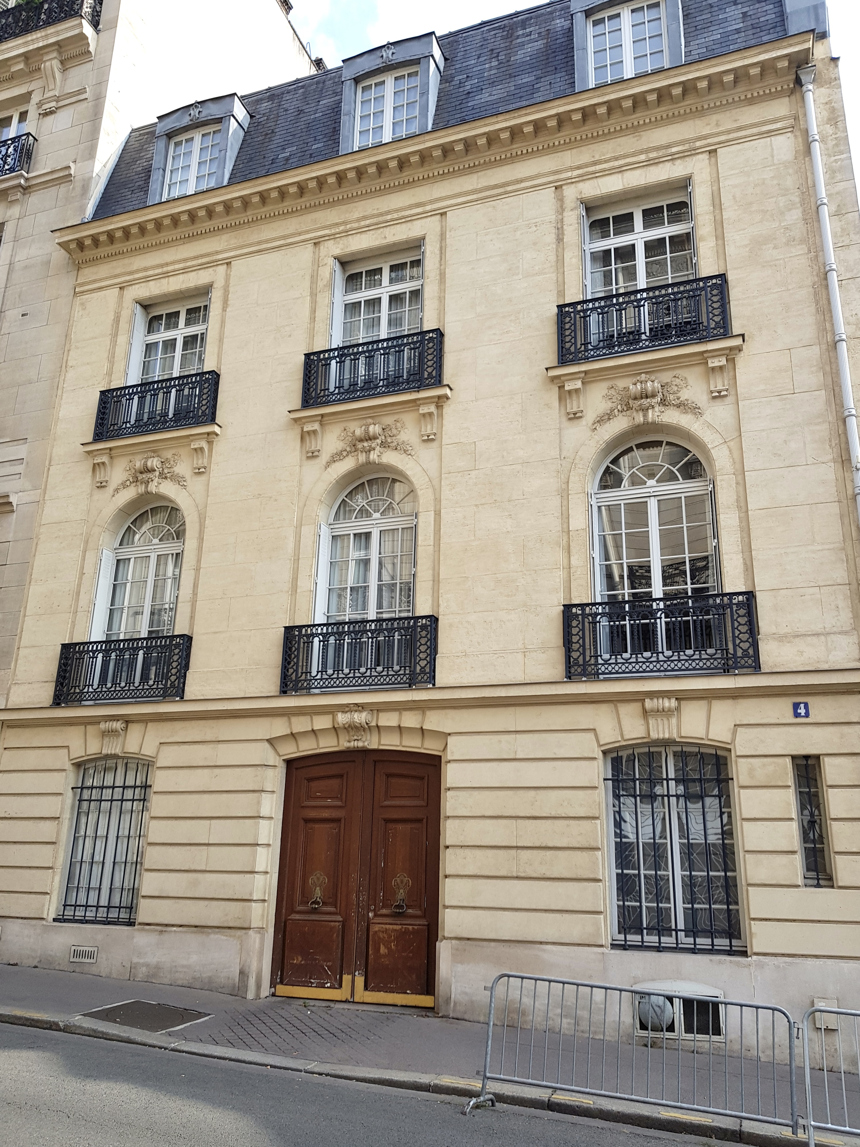 N° 4, rue Freycinet, Paris 16e.